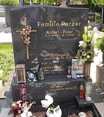 Grabstein Peter Parzer